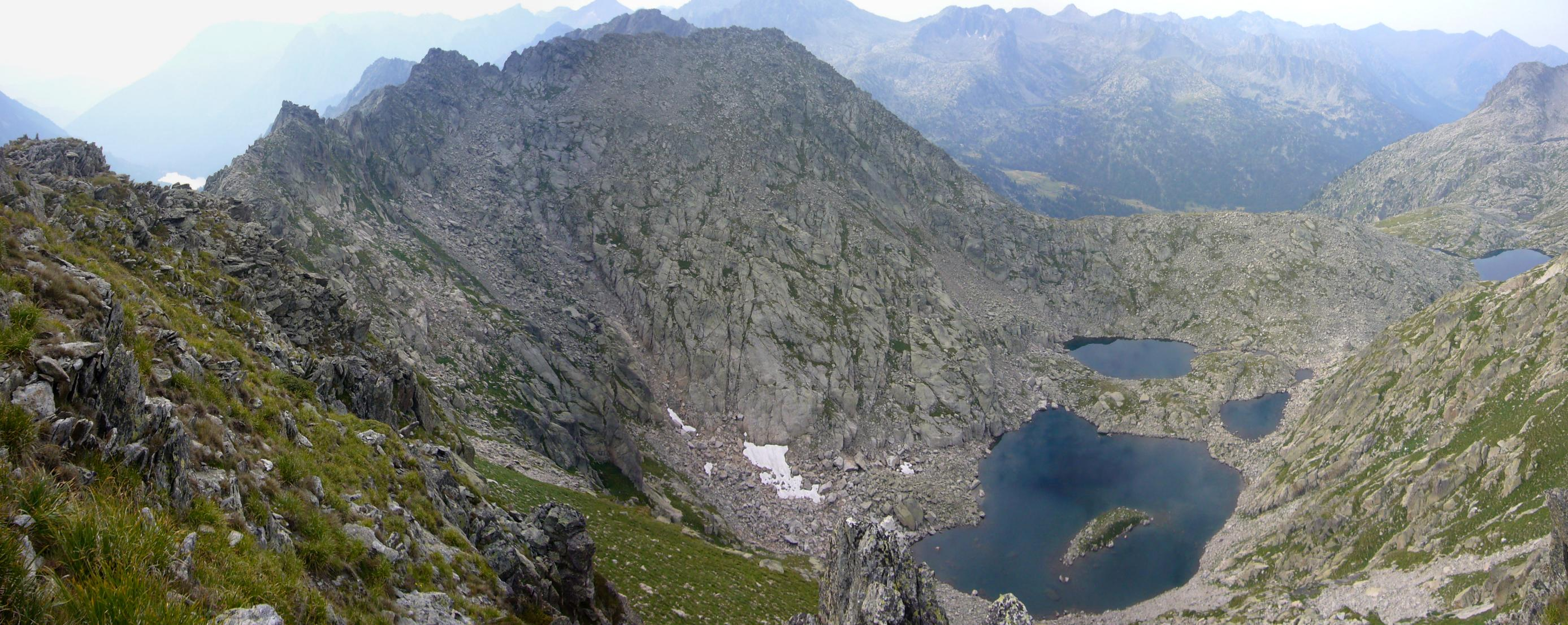 Estanys Gelats del Bergús i Cap de Crabes; Espot, Pallars Sobirà, Catalunya